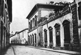 Palazzo pandofini, 1860s.jpg